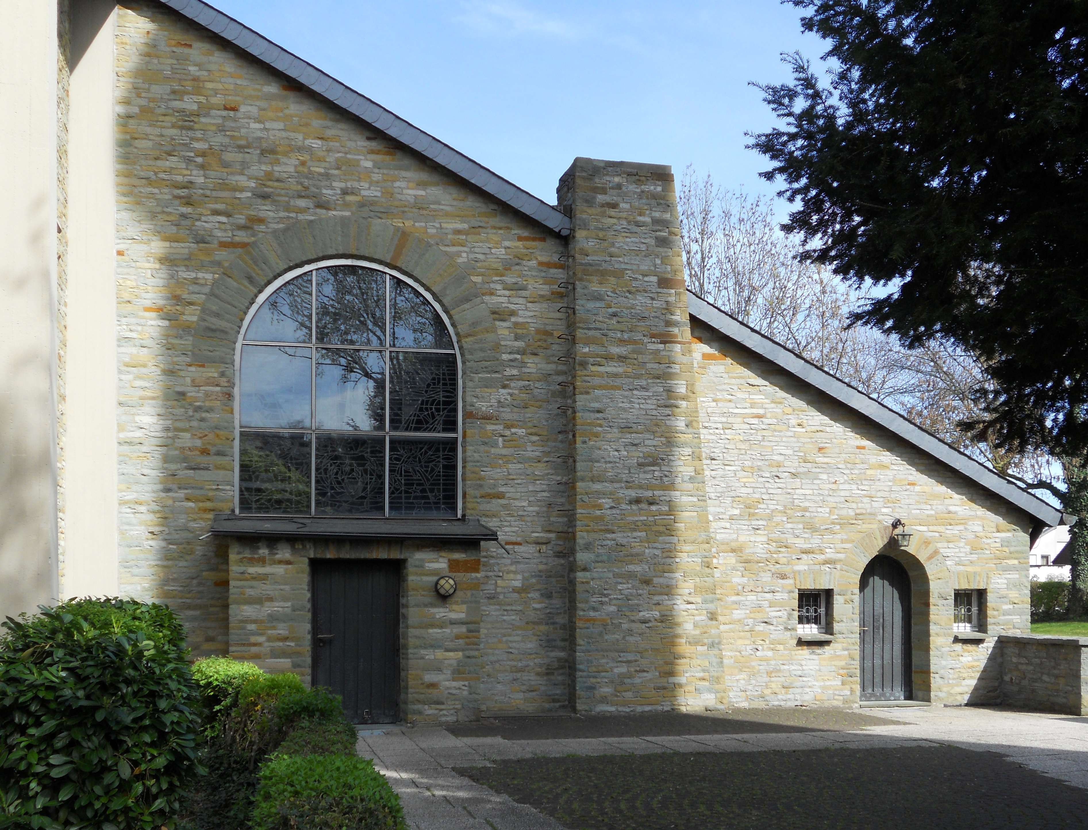 Werl, St.-Norbert-Kirche, Sakristei und Kapelle, Außenansicht